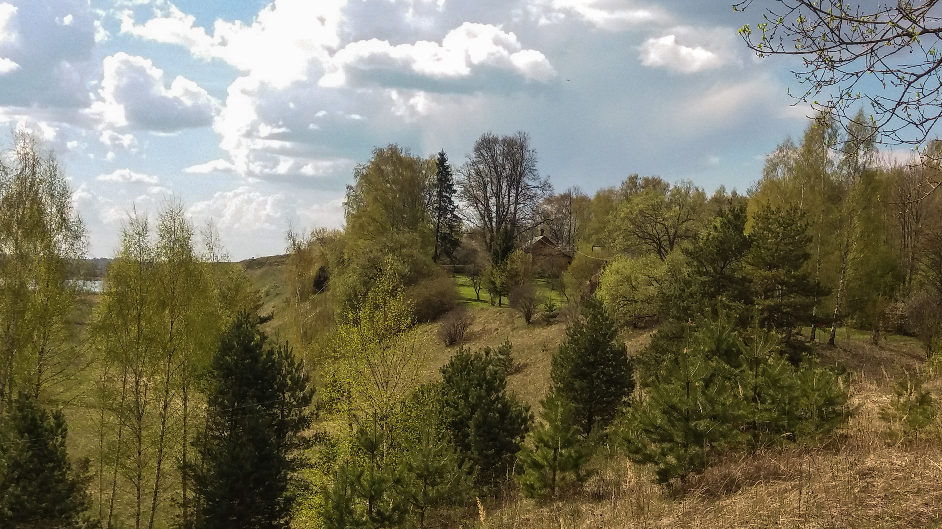 Ķīšu kalns hillfort east of lake Ludza